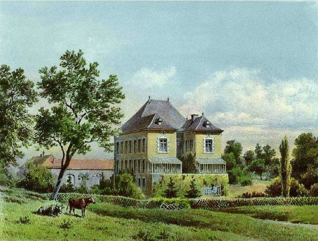 Schloss Schönau, Lithografie aus dem 19. Jahrhundert